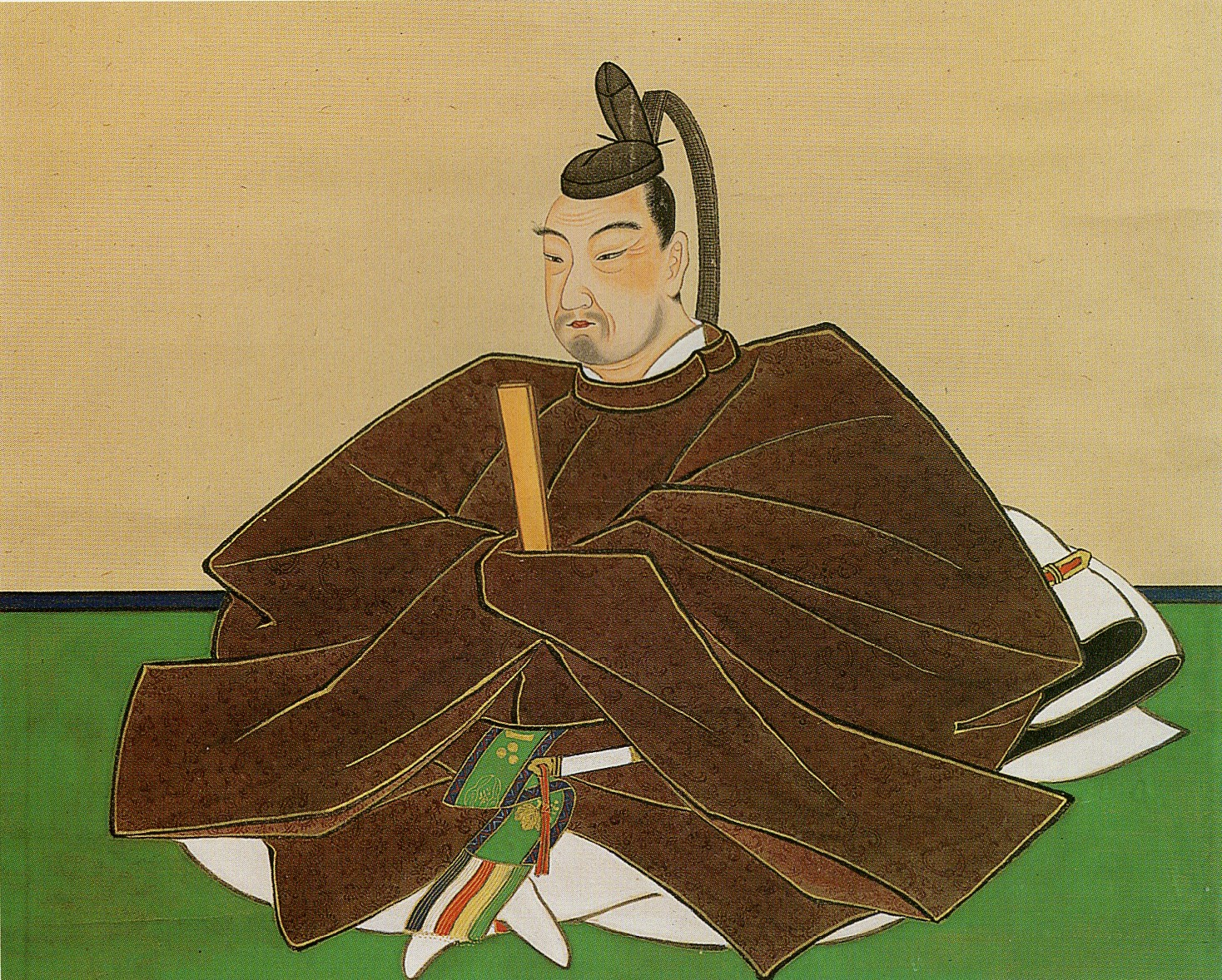 徳山藩五代藩主・毛利広豊の肖像画。